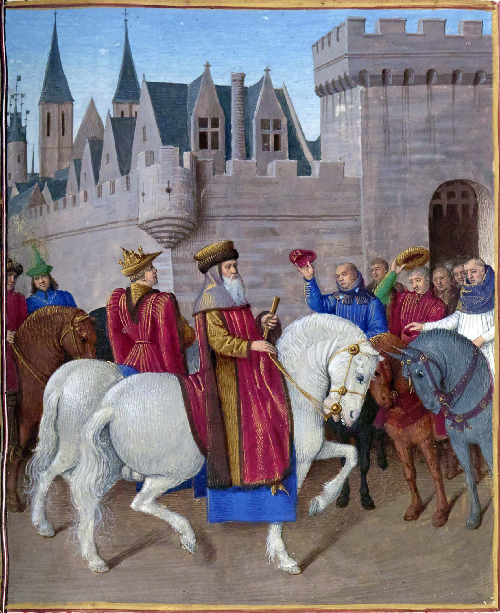 Entrée de l'empereur Charles IV à Cambrai. Grandes Chroniques de France, enluminées par Jean Fouquet, Tours, vers 1455-1460 Paris, BnF, département des Manuscrits, Français 6465, fol. 441 (Livre de Charles V) Le 22 décembre 1378, l'empereur Charles IV et son fils Wenceslas, accompagnés par les messagers du roi venus les accueillir à quelques lieues de la ville, rencontrent l'évêque et les bourgeois de Cambrai.